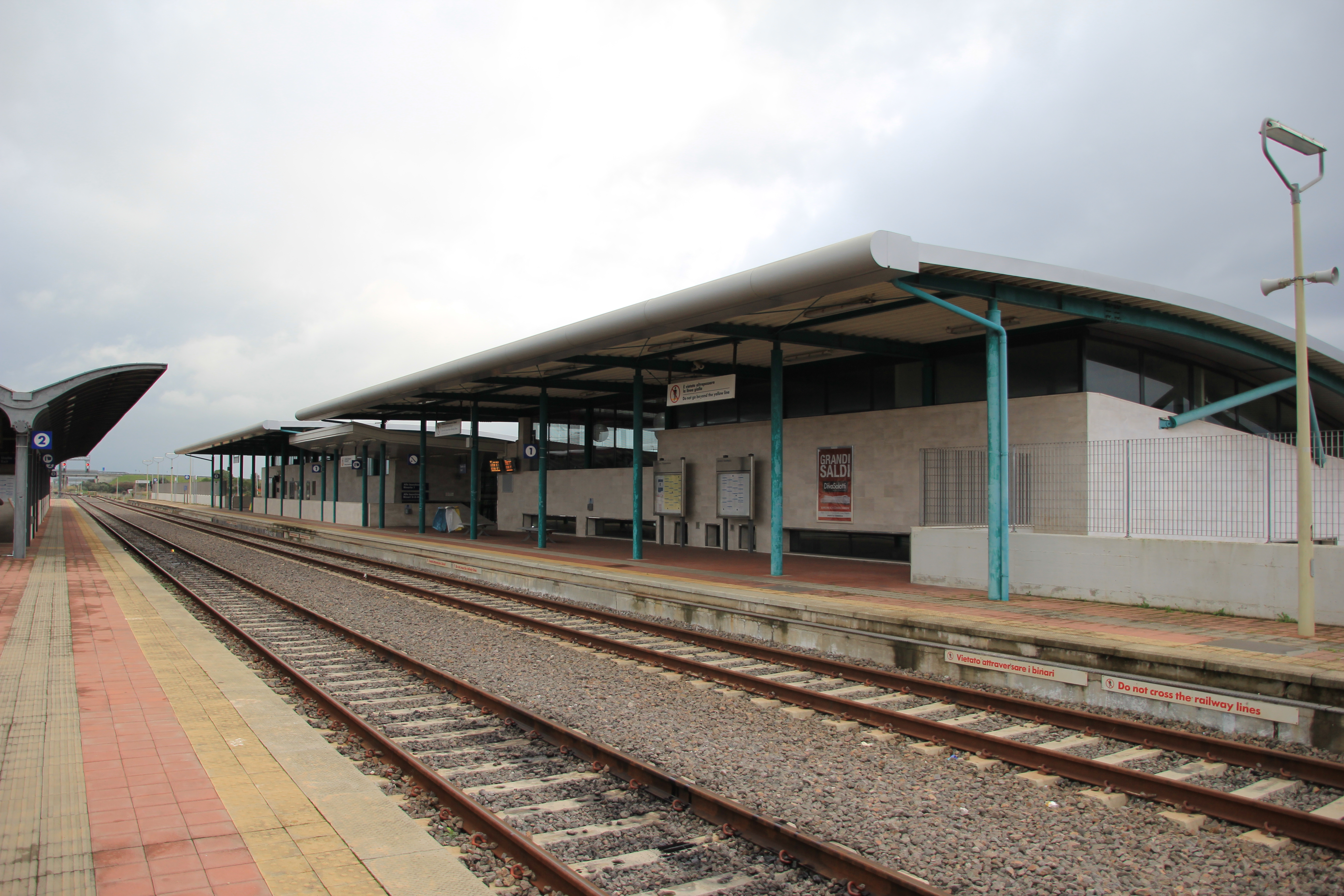 San Gavino Monreale - Stazione ferroviaria